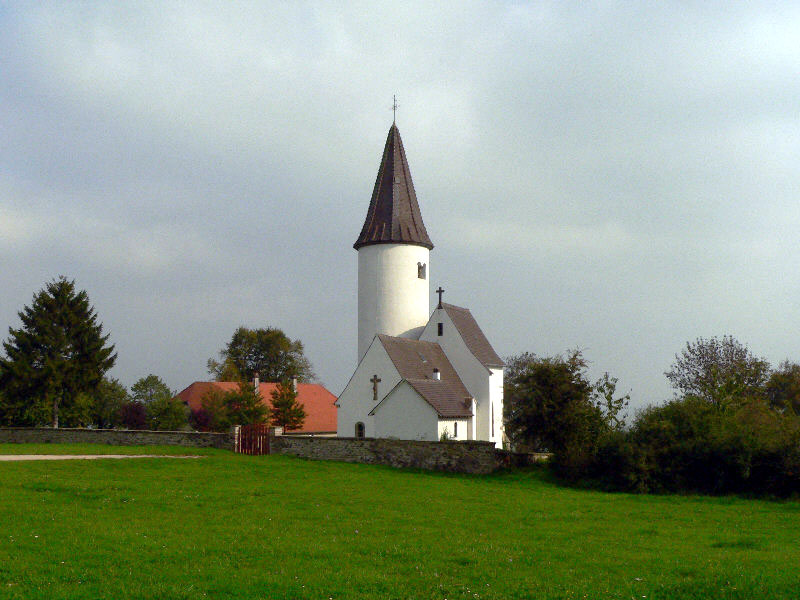 Die Rundturmkirche St. Martin in Berg/Elsaß, Frankreich Sonstiges: freie Lizenz